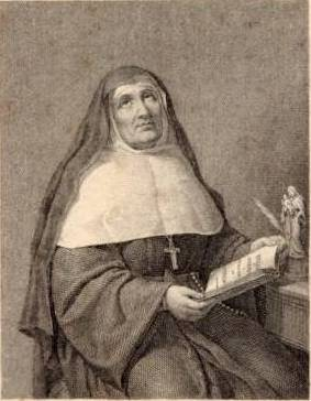 Неизвестный автор. Жанна де Лестоннак (1900 год)